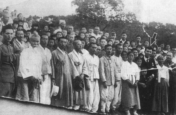 해방 후 평양에 온 김일성이 1945년 10월 14일 평양시 민중대회에서 처음으로 대중 앞에 나서 연설을 했다. 하지만 그가 가짜 김일성 장군이라며 청중들 사이에 소요가 일어나자, 집회가 끝난 후 기자들과 여러 사람들을 만경대 마을로 데려가 친척들을 만나는 장면을 연출해 보여주며 가짜라는 소문의 확산을 막으려할 당시의 사진. 앞줄 왼쪽 끝이 강미하일 소좌, 오른 쪽 끝이 그리고리 메클레르 중좌이다. 화살표가 김일성을 가리키고 있다. 세 사람의 복장이 민중대회 행사 당일날의 것과 동일하며, 김일성은 여전히 적기훈장을 달고 있다.